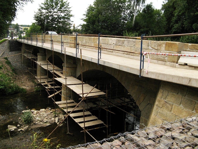 Silniční most kamenný (Verměřovice), na konci obce, Verměřovice